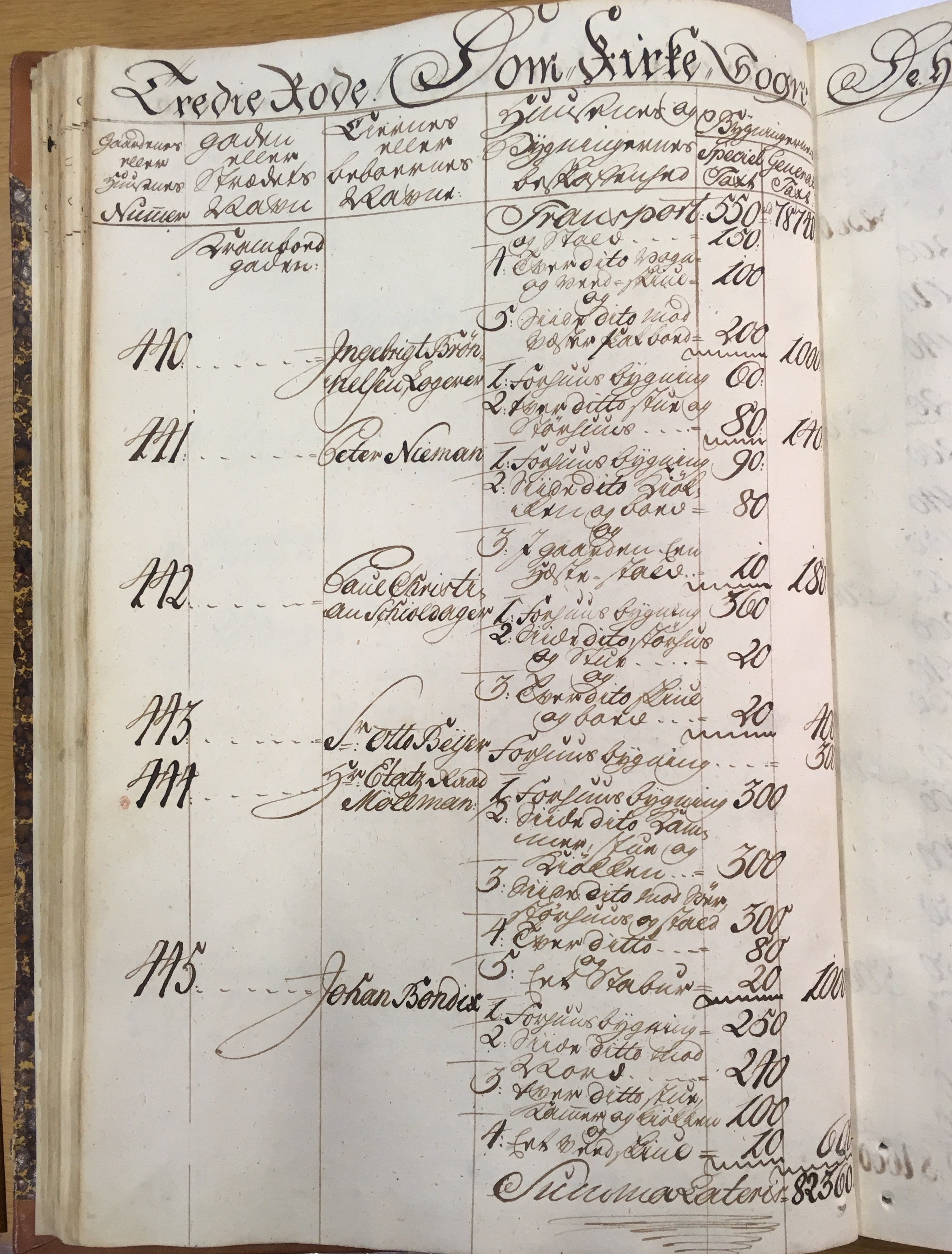 Utdrag av Trondheim Magistrat. Branntakst 1767 for Kramboedgaden (Krambugata)